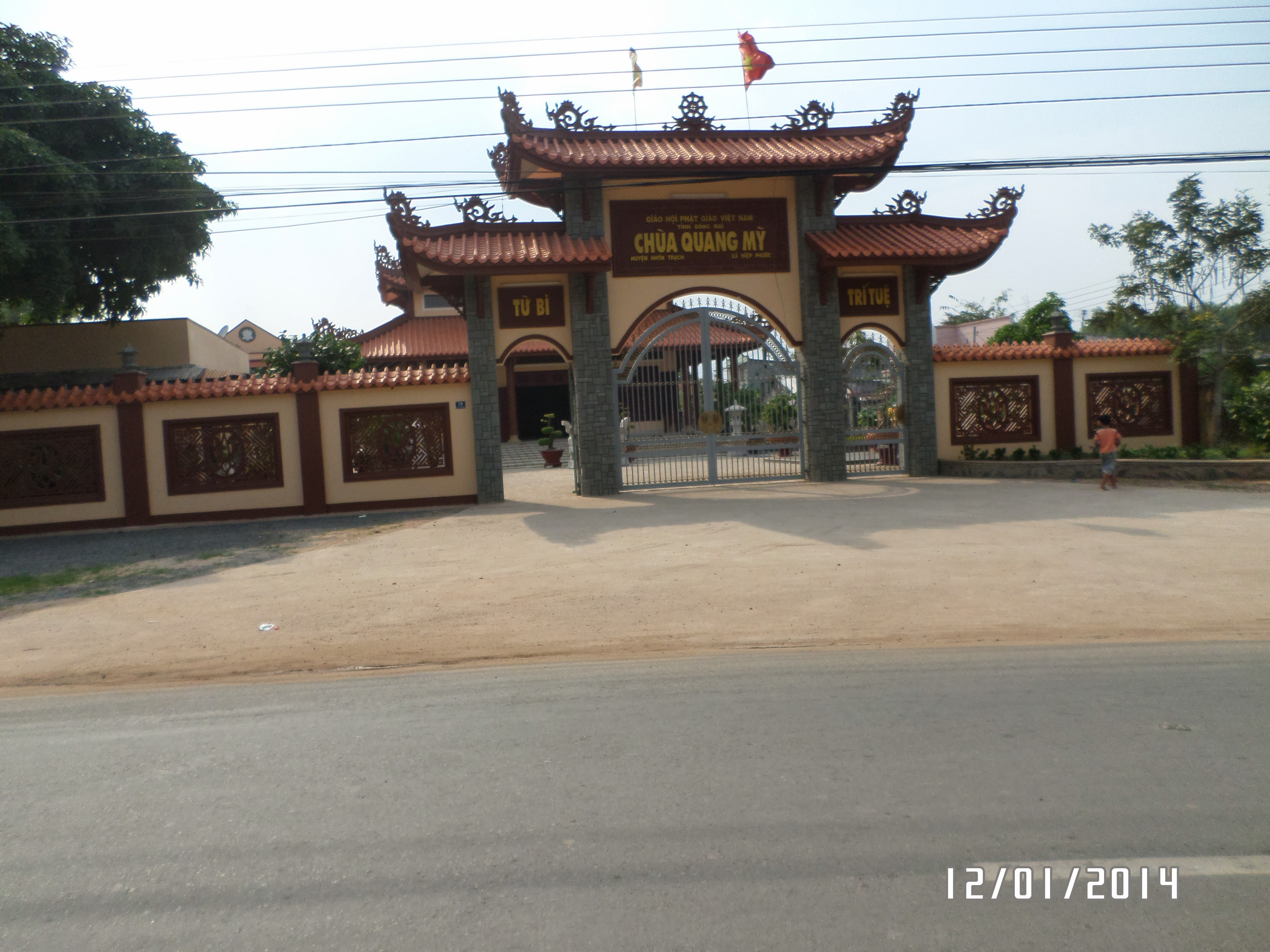 tt. Hiệp Phước, Nhơn Trạch, Đồng Nai, Vietnam